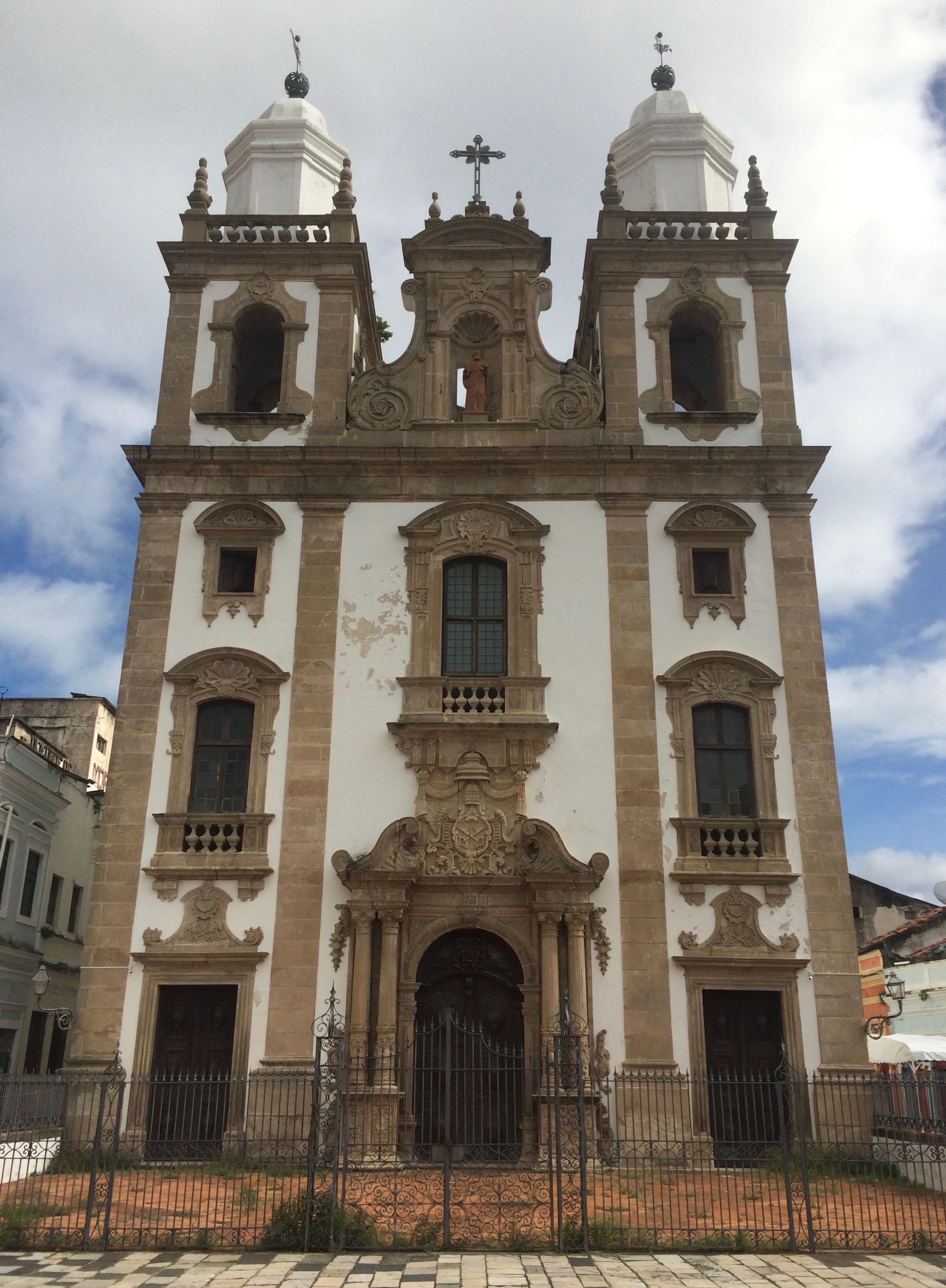 Igreja de São Pedro dos Clérigos e Pátio de São Pedro: conjunto arquitetônico